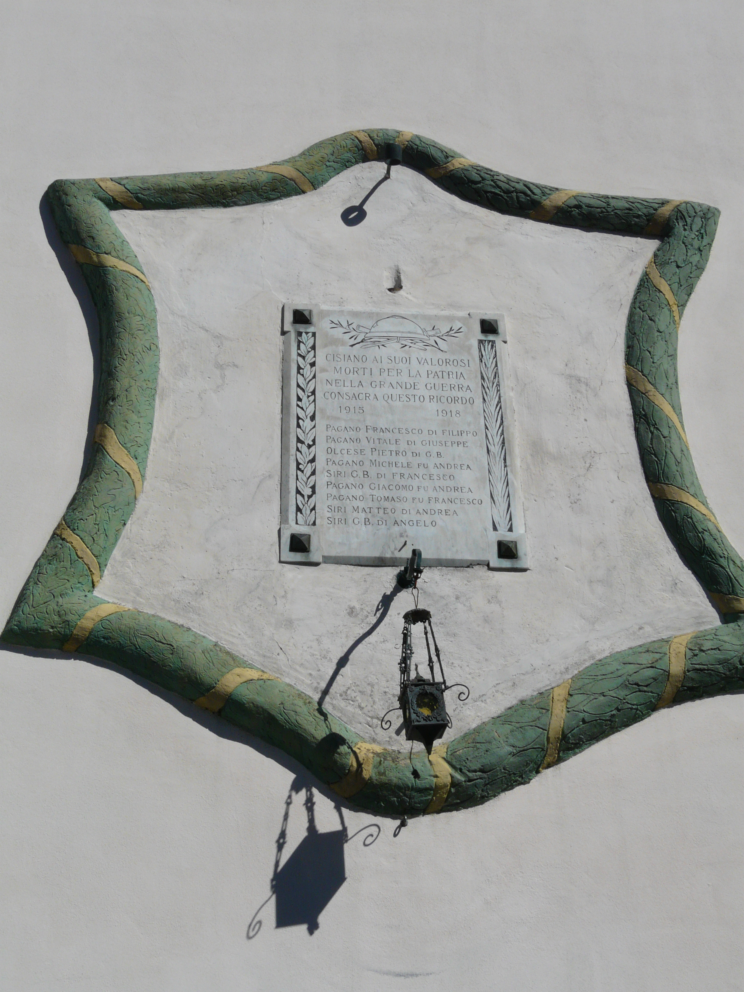 Monumento ai caduti presso la chiesa della Visitazione di Maria Santissima, Cisiano, Bargagli, Liguria, Italia